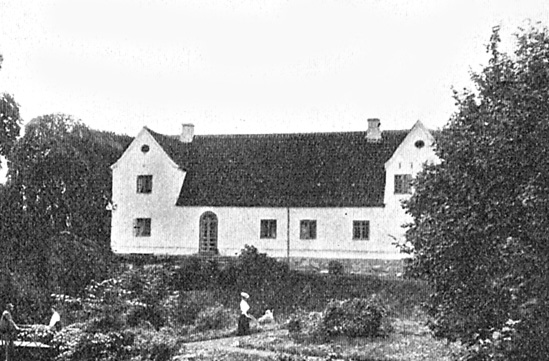 Billeskov er en hovedgård, som nævnes første gang i 1580, og er nu en avlsgård under Wedellsborg Gods. Gården ligger i Kerte Sogn, Båg Herred, Aarup Kommune. Hovedbygningen er opført i 1796.